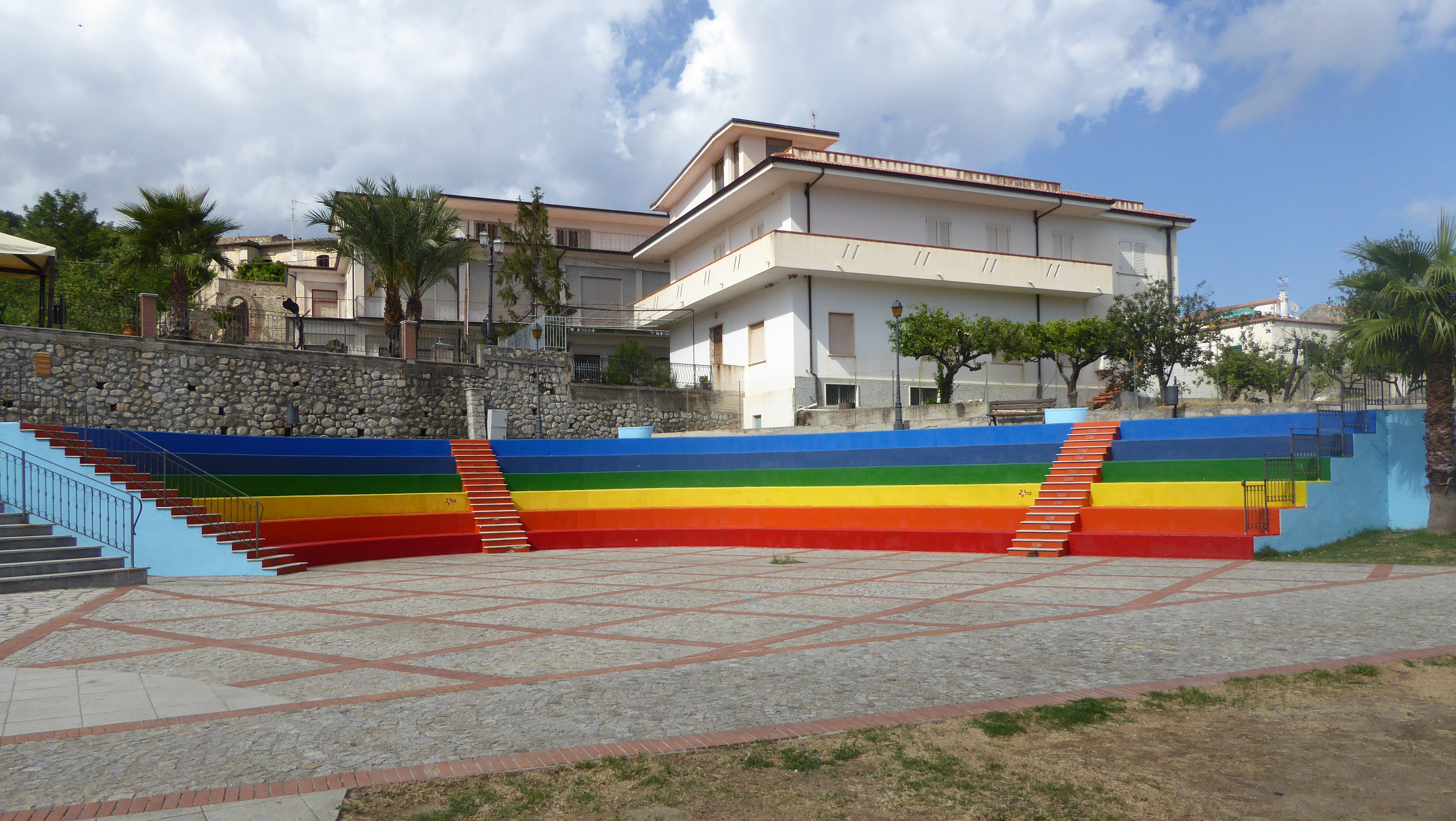 Anfiteatro di Riace